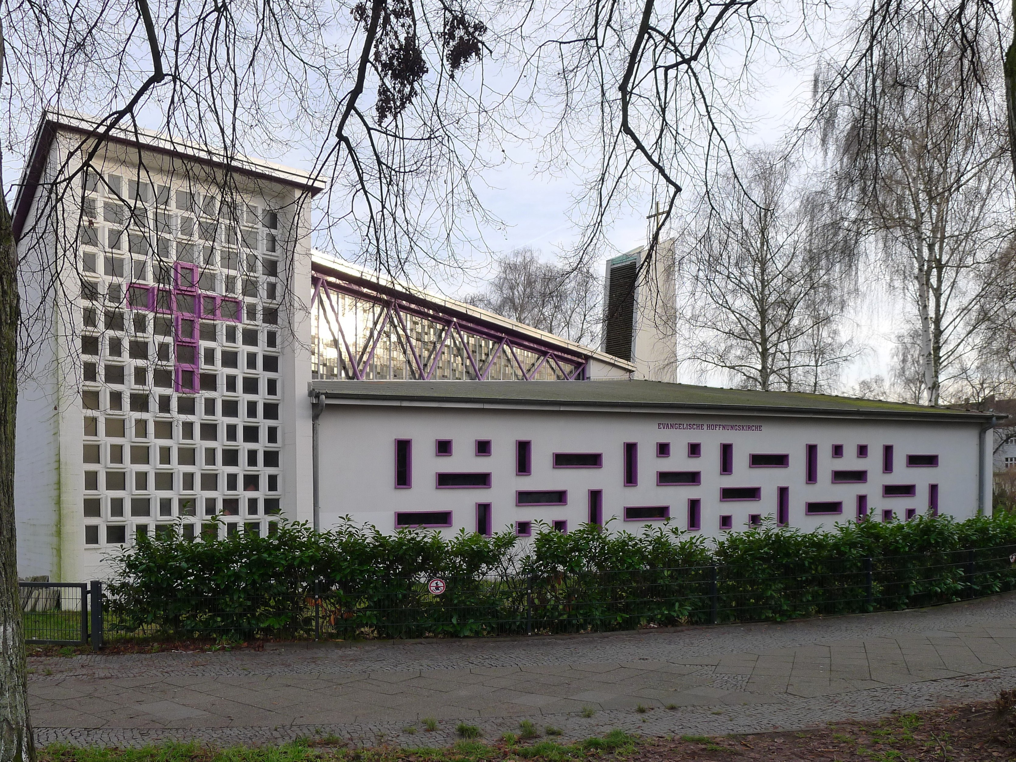 Blick auf das Kirchenschiff, im Hintergrund der Campanile